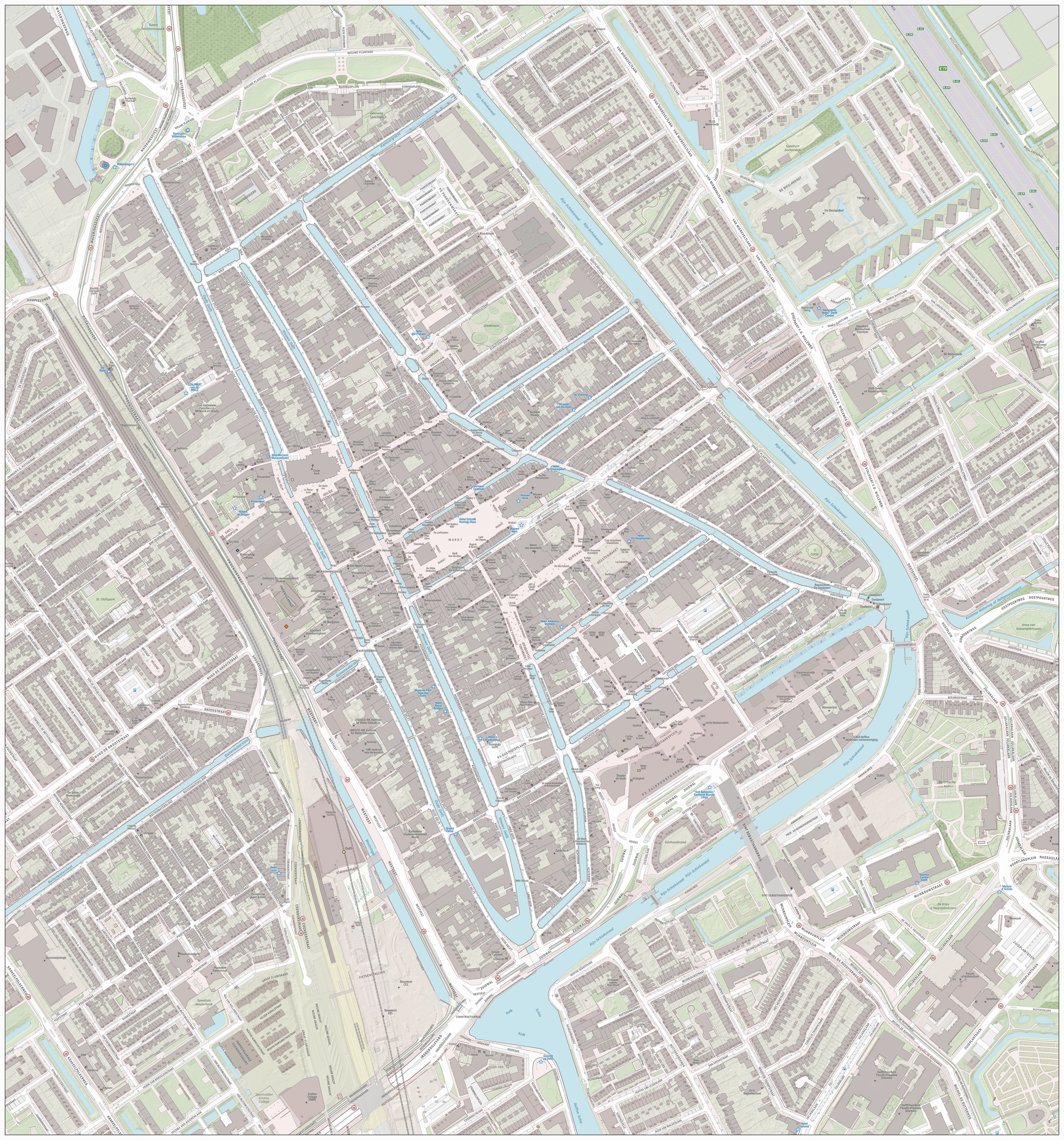 Topografische kaart van Delft (centrum van woonplaats). Resolutie: 2688 pixels/km. Kaartbeeld samengesteld uit de open geodata van de Basisregistratie Grootschalige Topografie (BGT), Creative Commons-BY Kadaster, en Top10NL en Top25namen (Basisregistratie Topografie, Kadaster), Creative Commons-BY Kadaster. Gebouwvlakken uit open geodata BAG extract, Creative Commons-BY Kadaster. Wegen uit de OpenStreetMap, CC-BY OpenStreetMap bijdragers. Reliëfschaduw uit de Actuele Hoogtekaart AHN2/AHN3. Samenstelling en kleurenschema: Jan-Willem van Aalst, met QGIS2. Zie ook de Legenda.